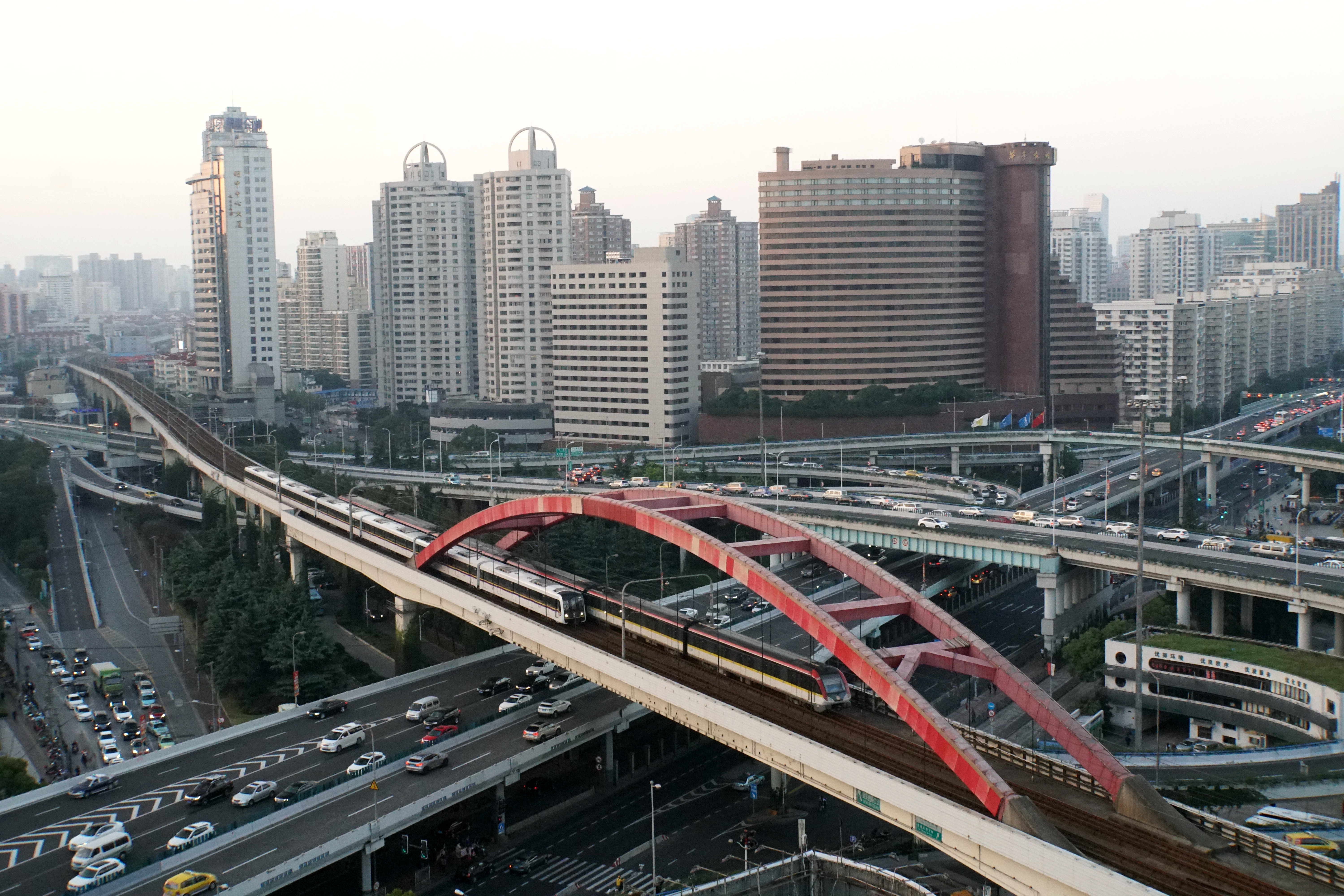 3号线两种列车行驶在内环高架路上方